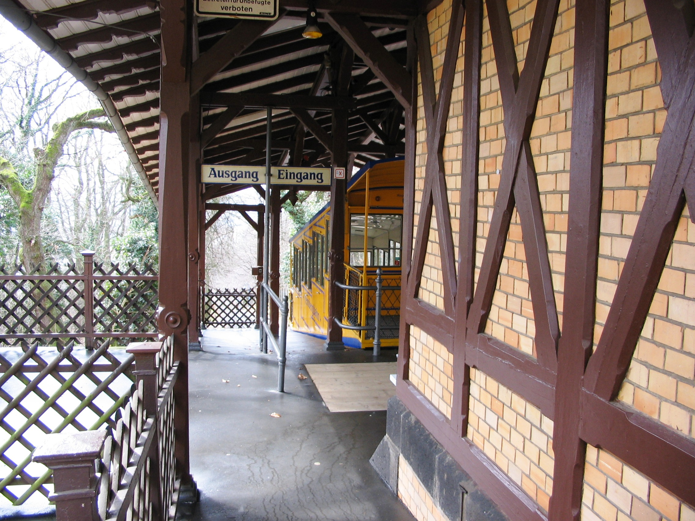 Bergstation der Nerobergbahn in Wiesbaden